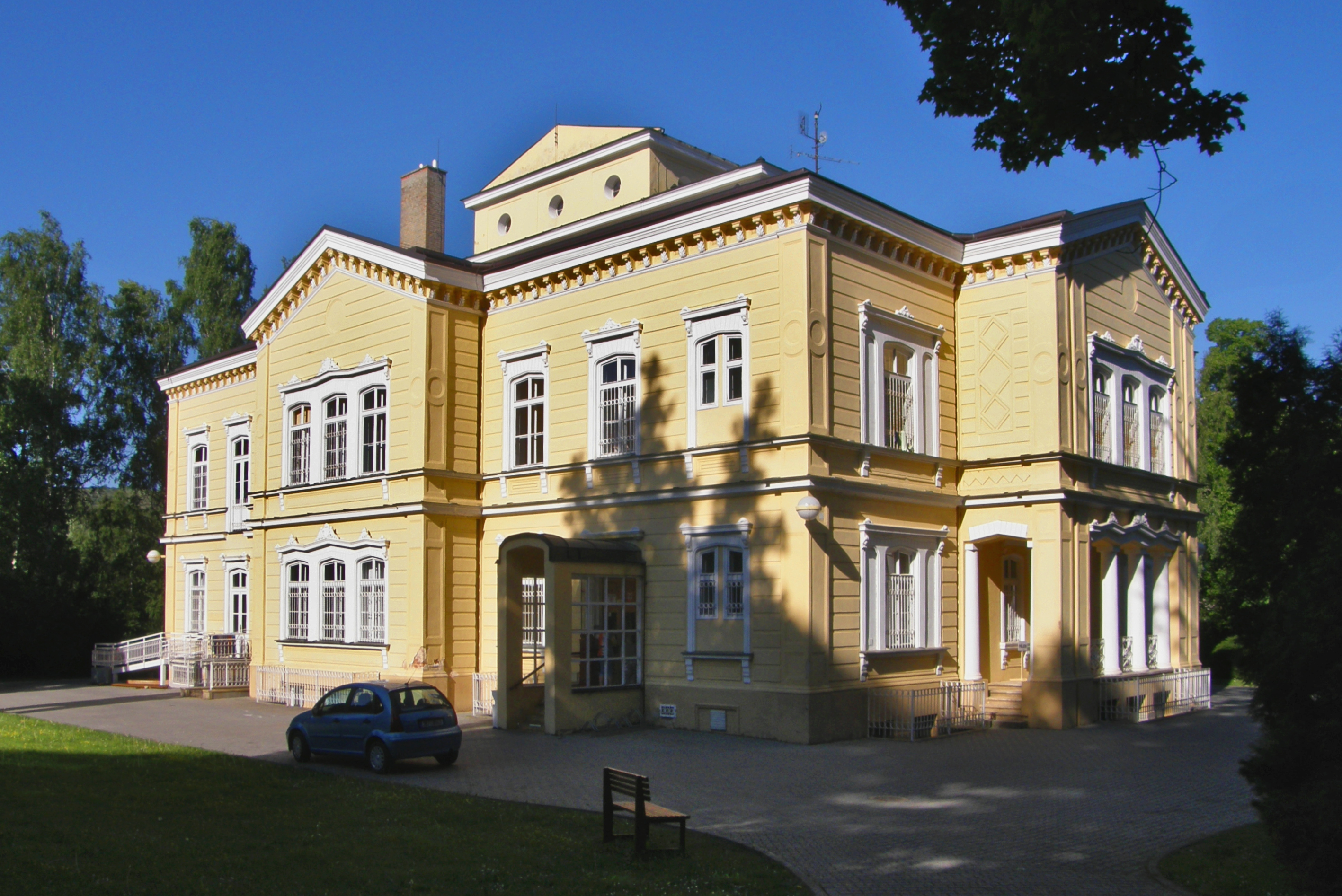 Zámek v obci Křetín v okrese Blansko